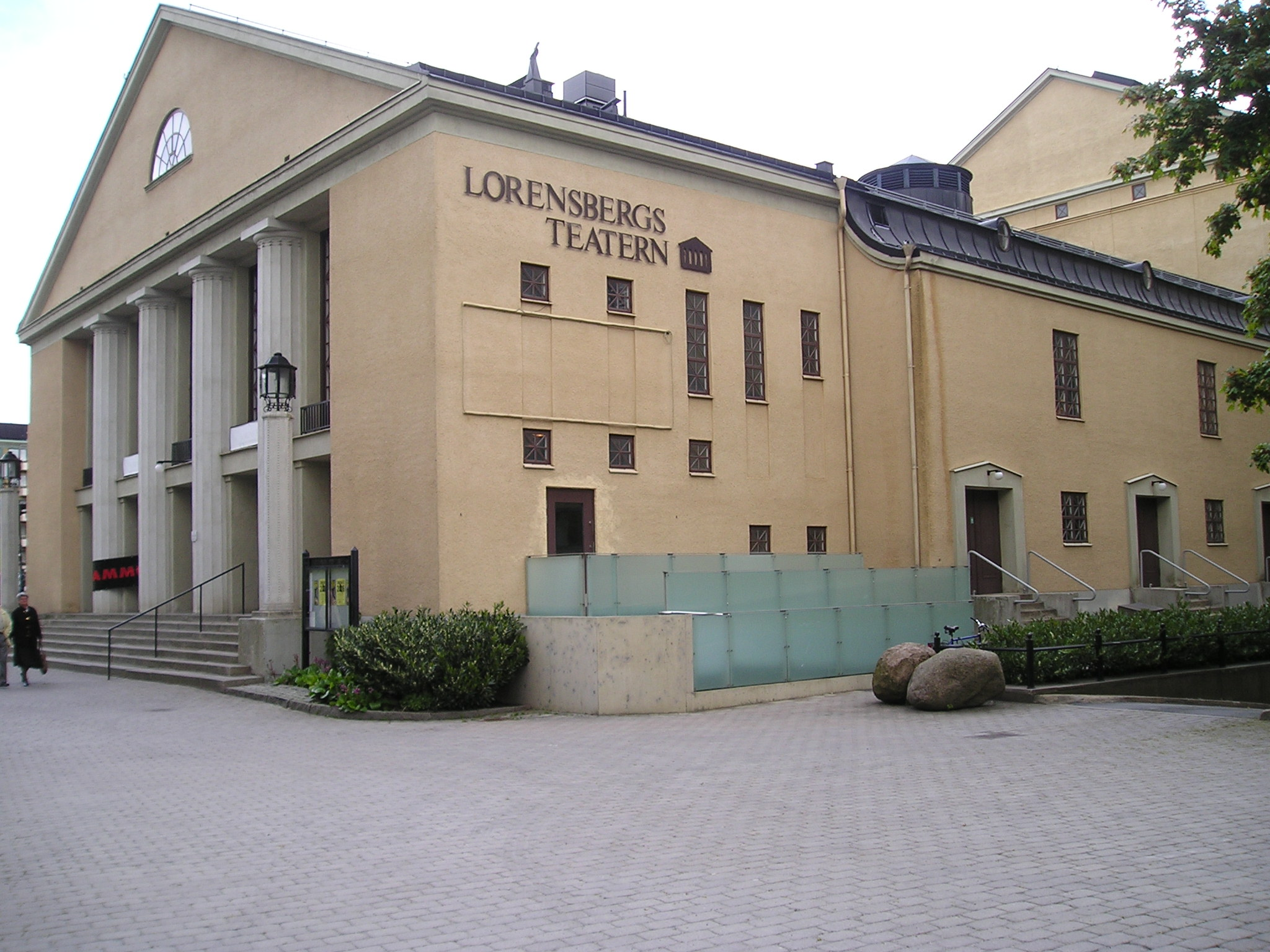 Lorensbergsteaterns entré.